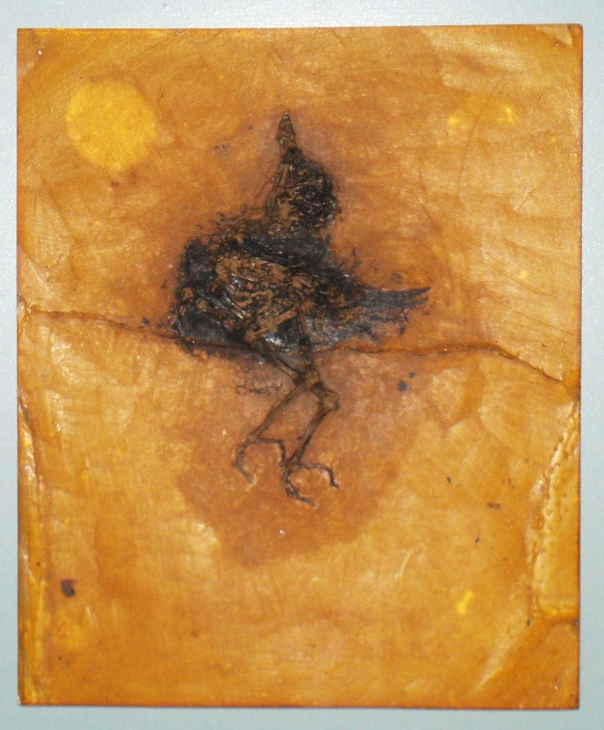 Fossil of Primozygodactylus, an extinct bird- Took the photo at Senckenberg Museum of Frankfurt